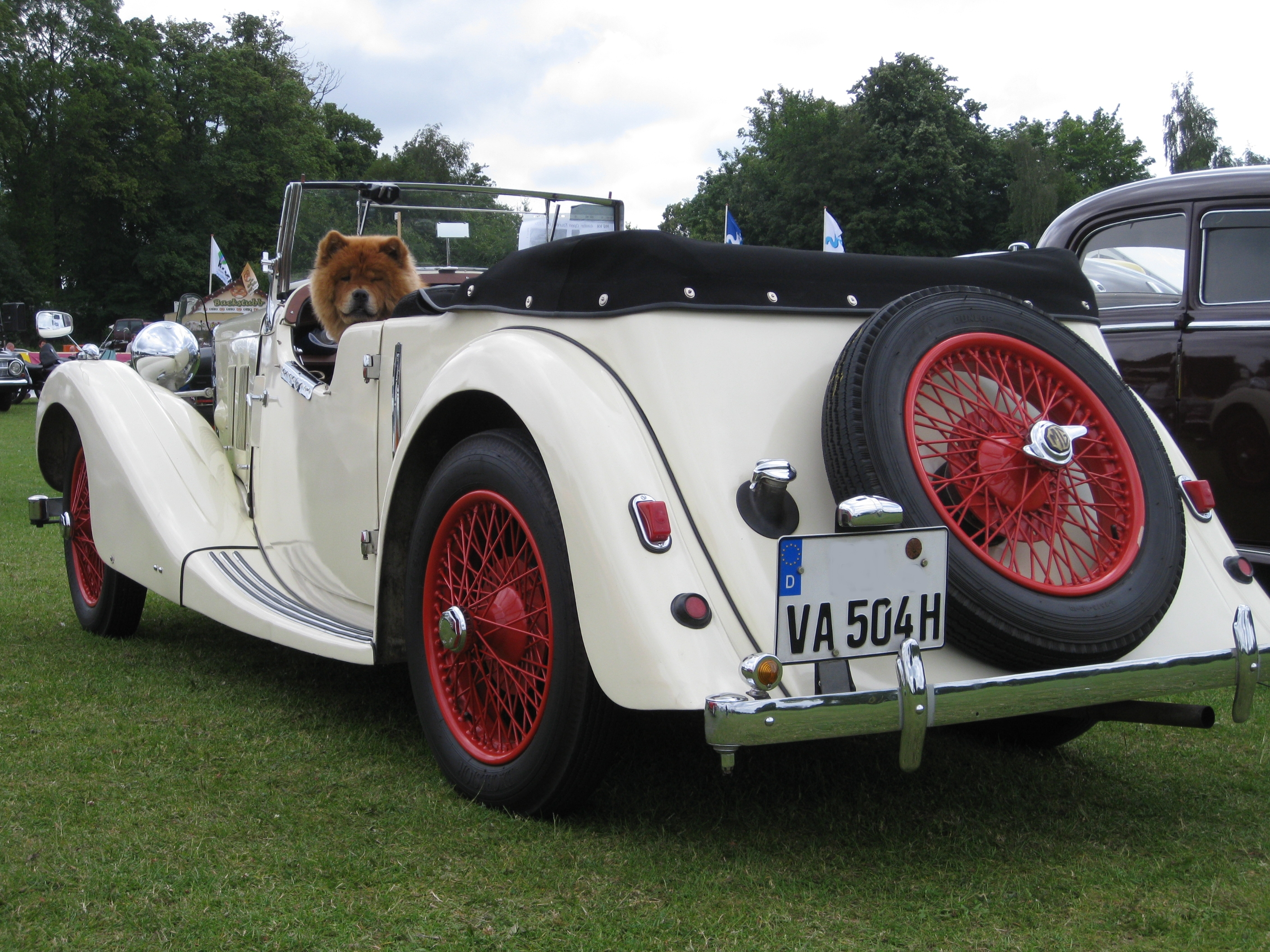 MG YA Roadster Heckansicht